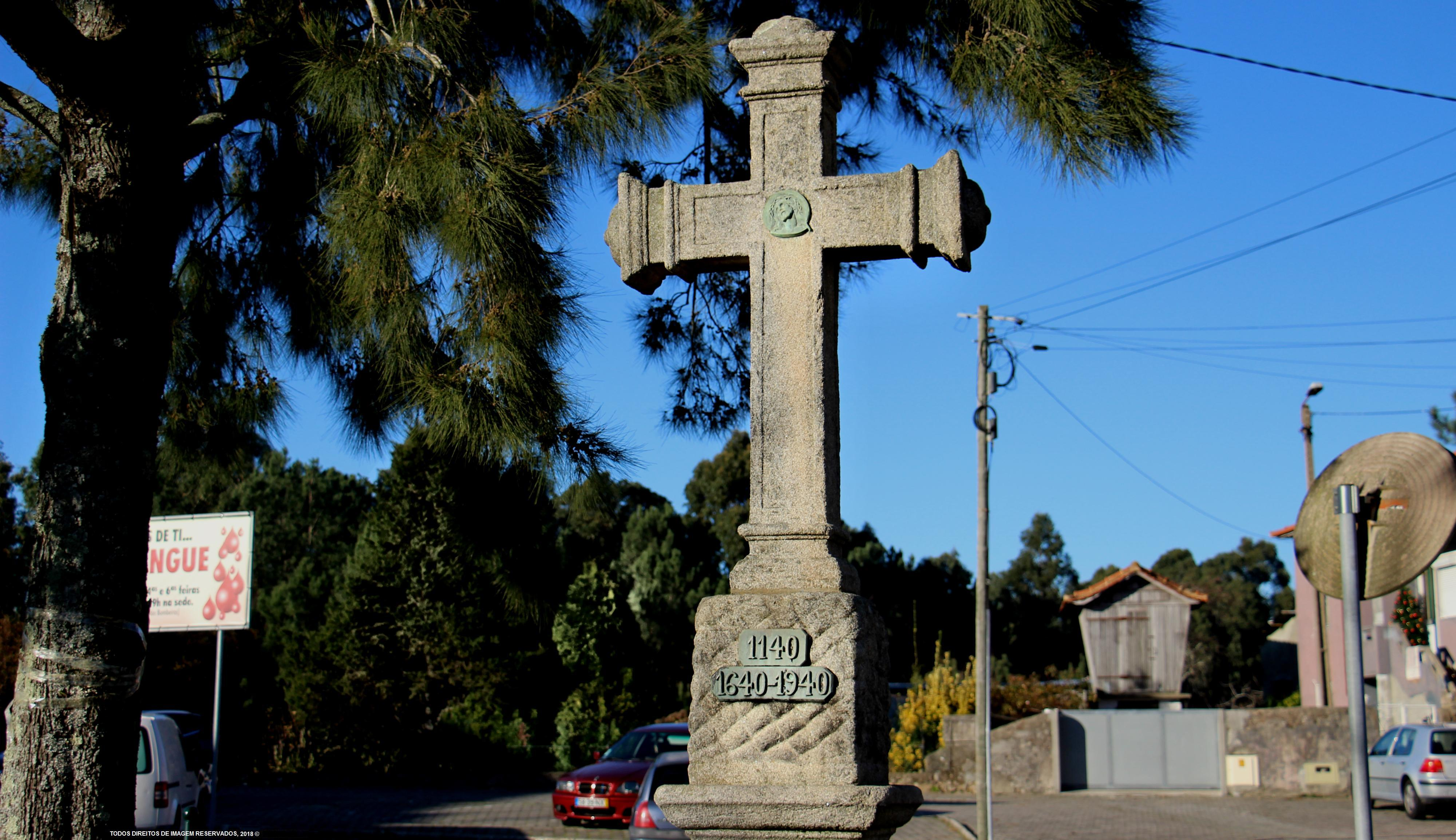 Cruz Milenar situada no centro de Argoncilhe.